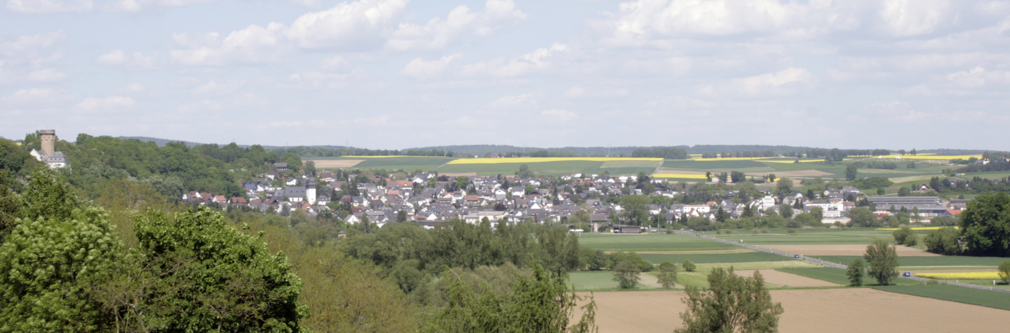 Ortsansicht von Dehrn, Deutschland, vom Kirchenfelsen in Dietkirchen (Süden) aus gesehen